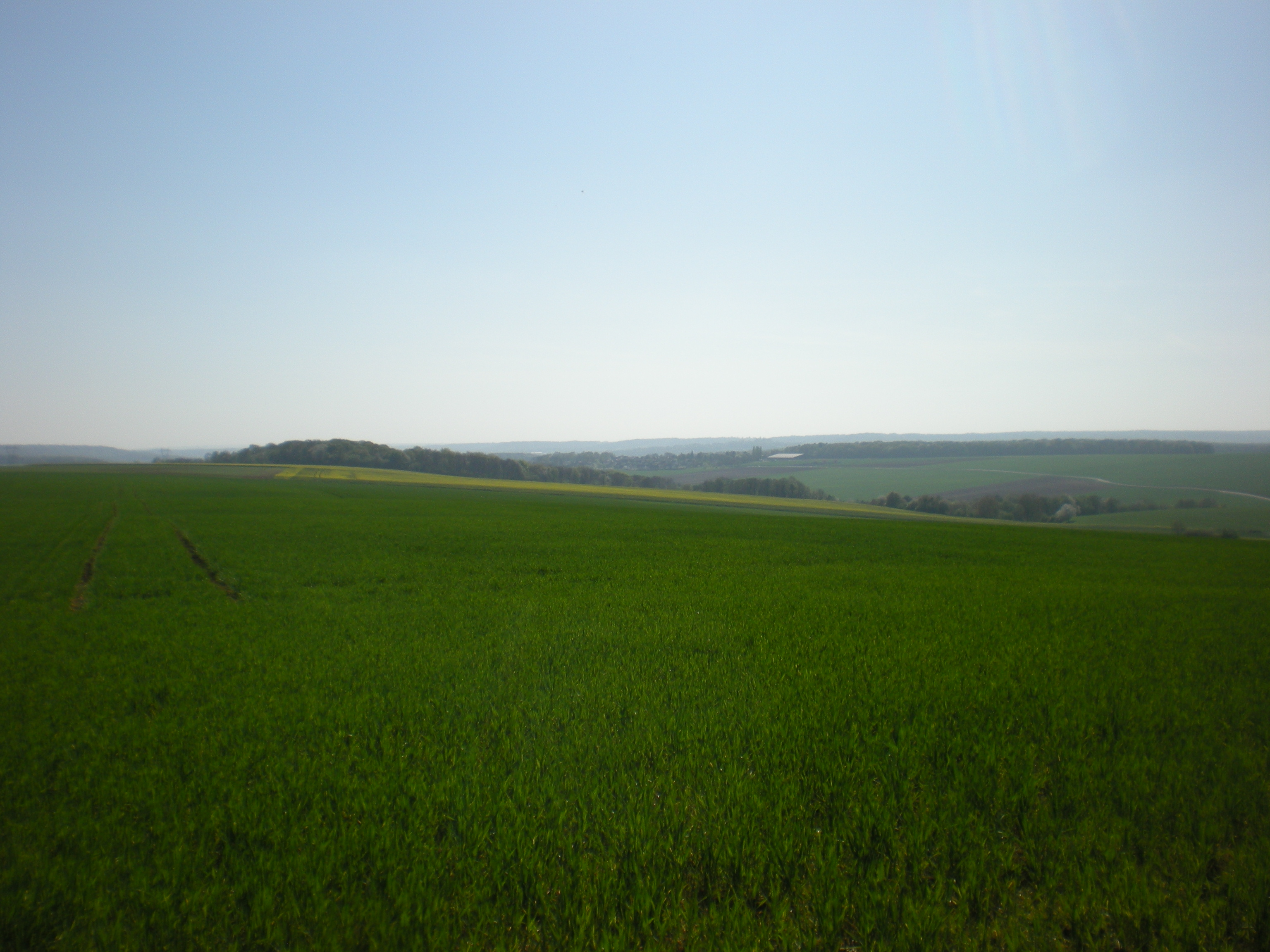 paysage vu de la côte de lamécourt